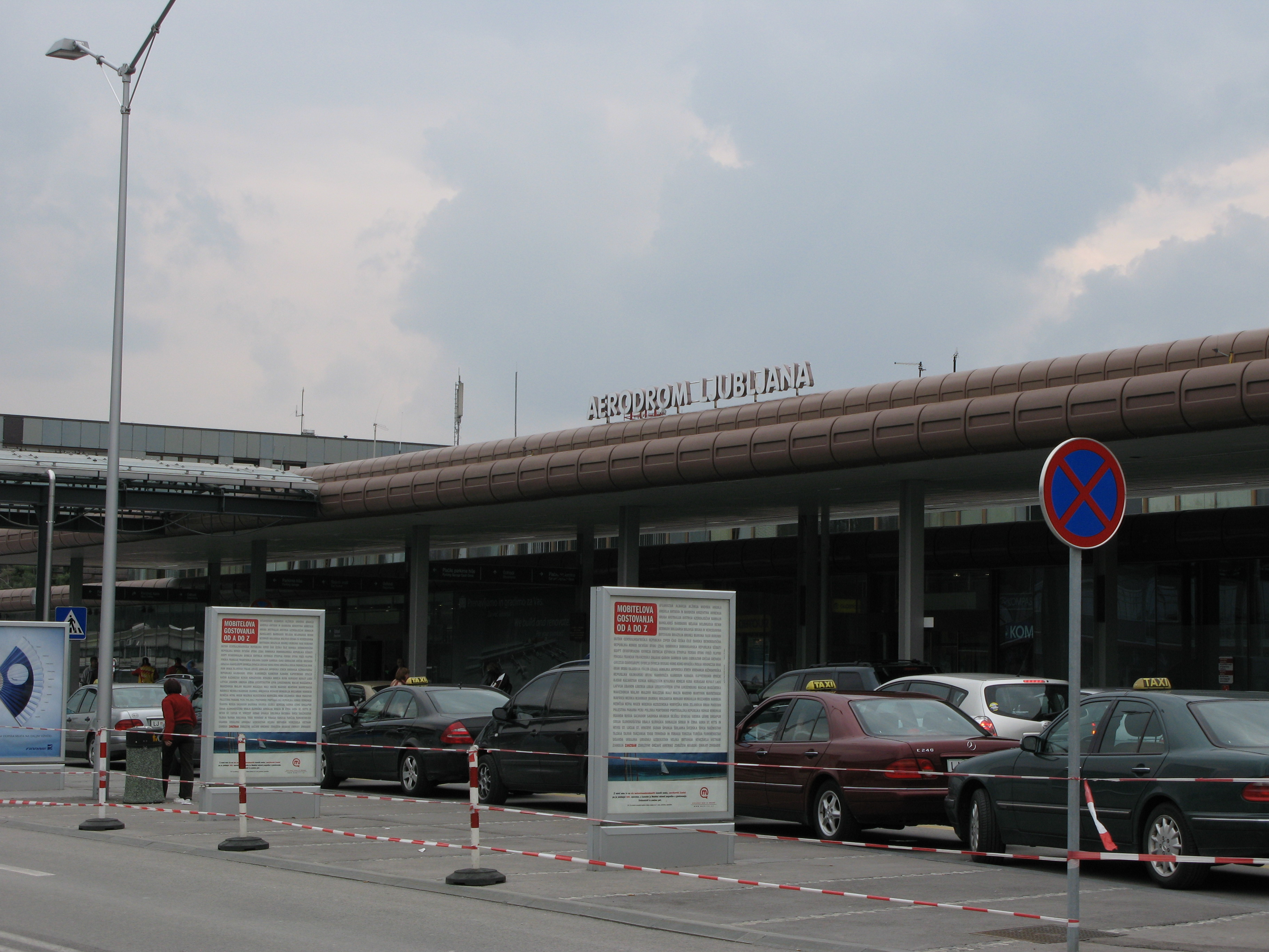 Ljubljana